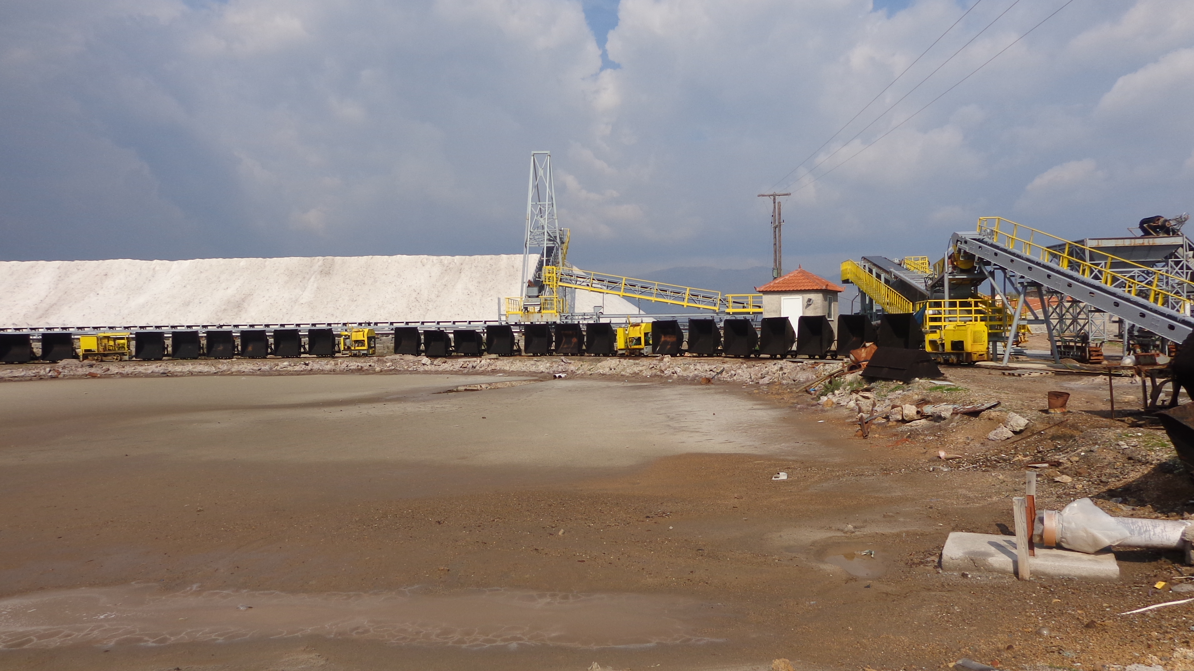 Τεχνολογικός εξοπλισμός αλυκών